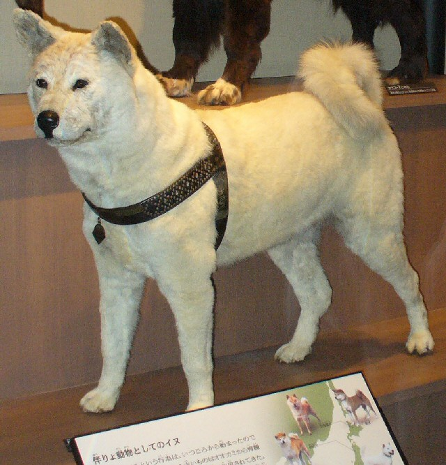 忠犬ハチ公-国立科学博物館剥製